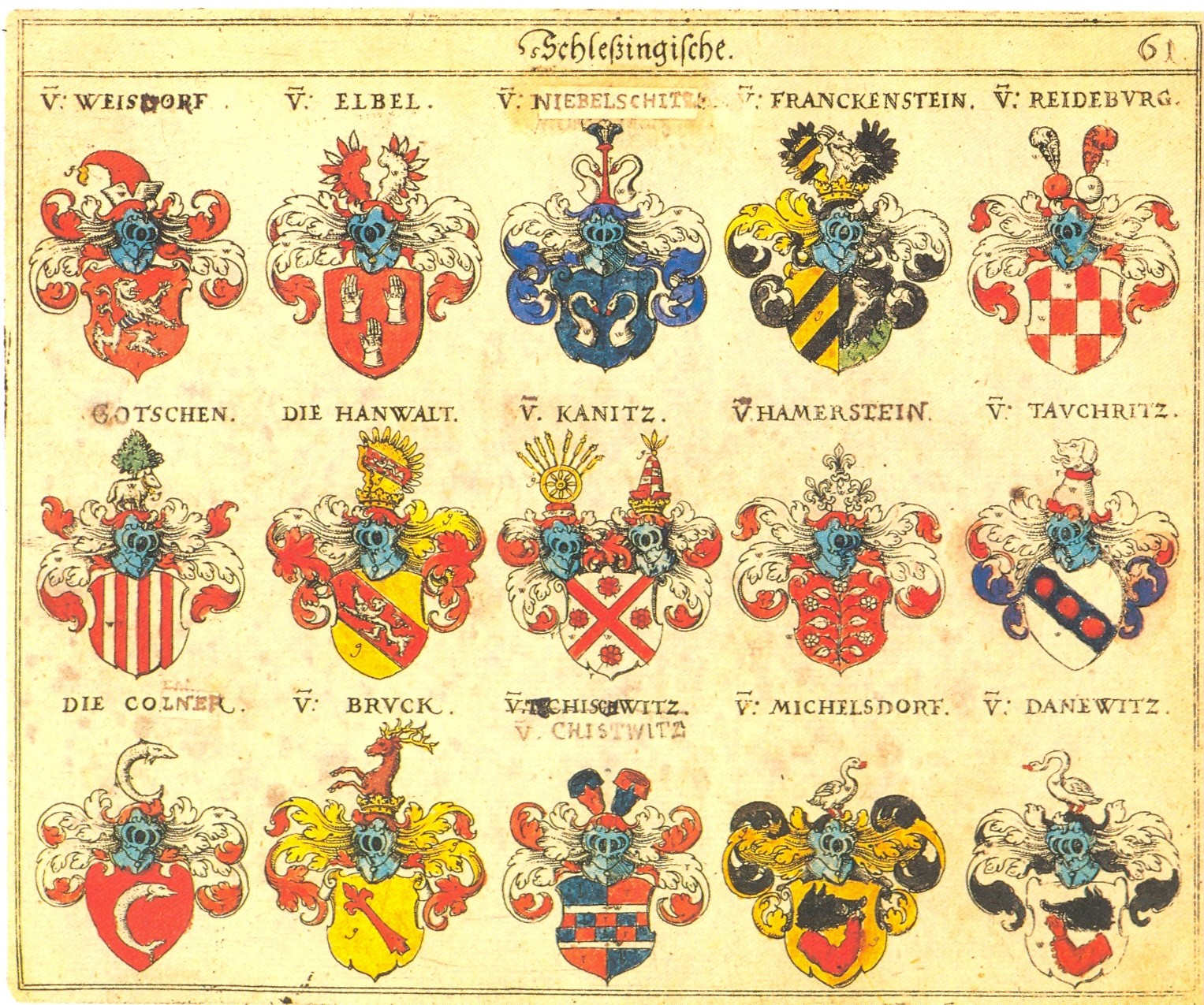 Johann Siebmacher: New Wappenbuch eingescannt aus: Horst Appuhn (Hrsg.), Johann Siebmachers Wappenbuch. Die bibliophilen Taschenbücher 538, 2. verb. Aufl , Dortmund 1989 Schlesische Blatt 61